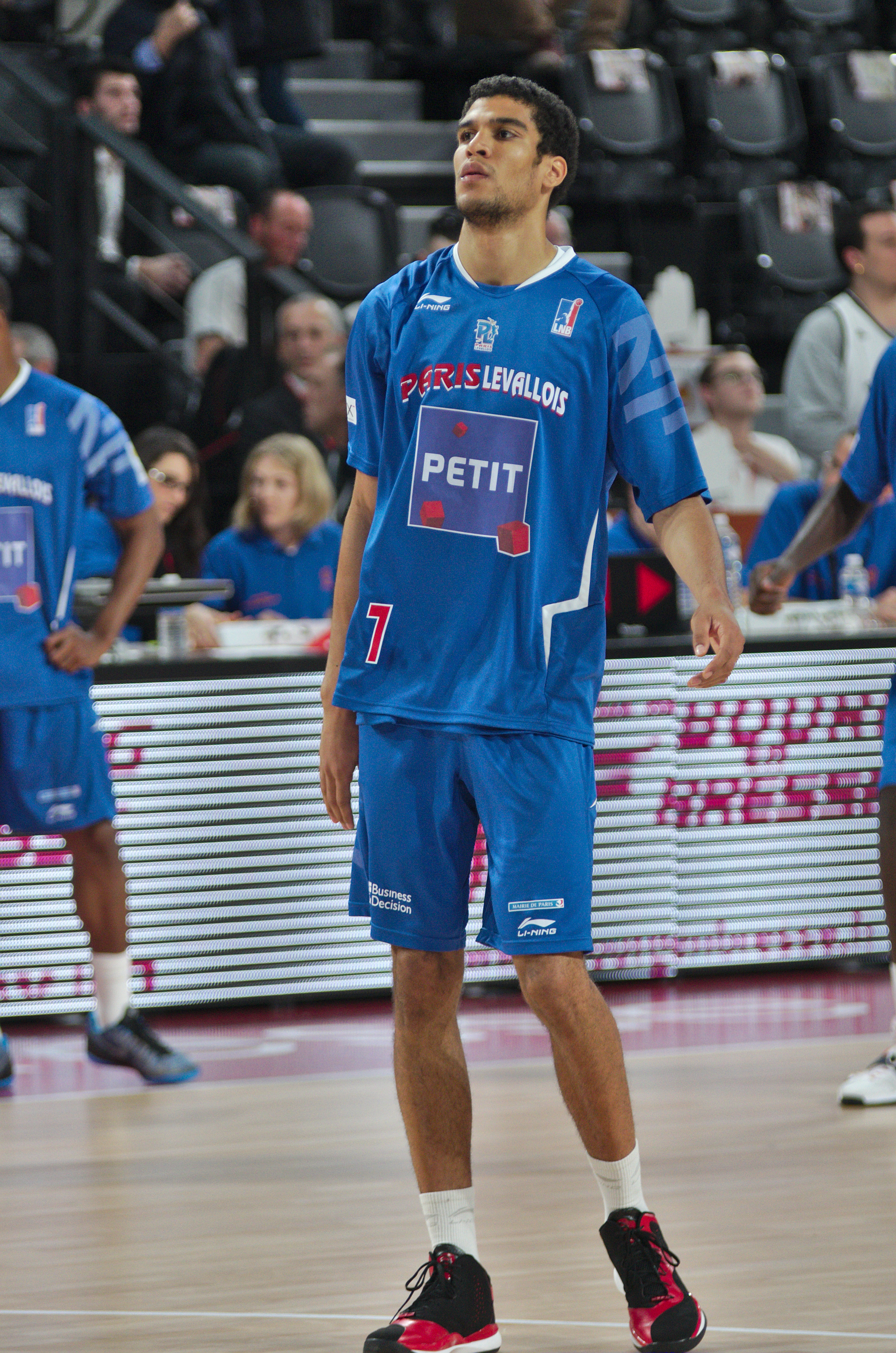 JLB vs PLB - 20141115 - Louis Labeyrie (PLB)